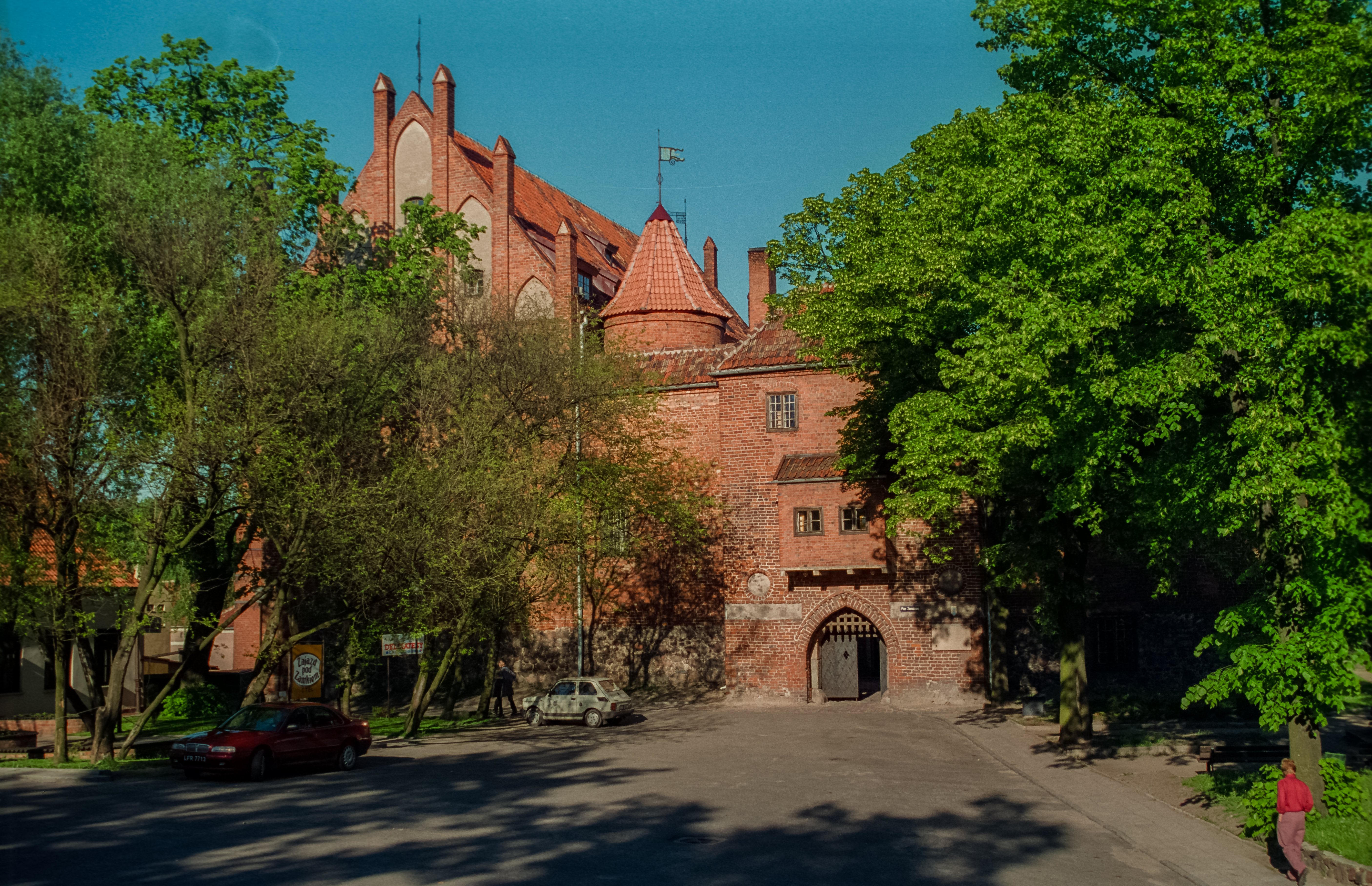 Kętrzyn